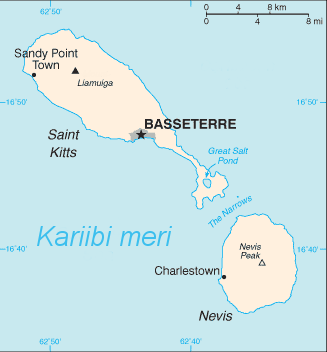 Saint Kittsi ja Nevise kaart